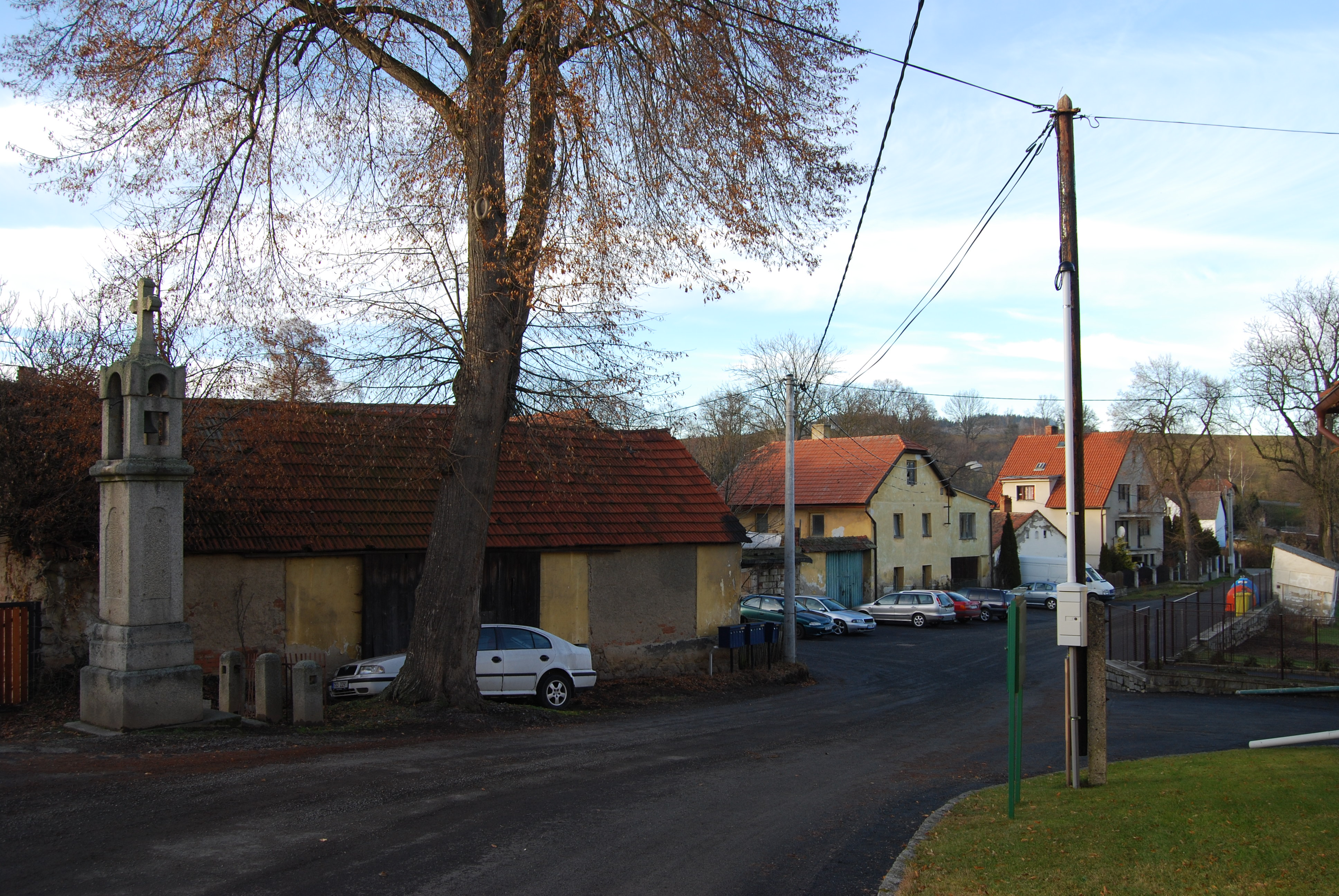 Kamenná zvonice v vsi. Doubravice je část města Sedlčany v okrese Příbram. Česká republika.